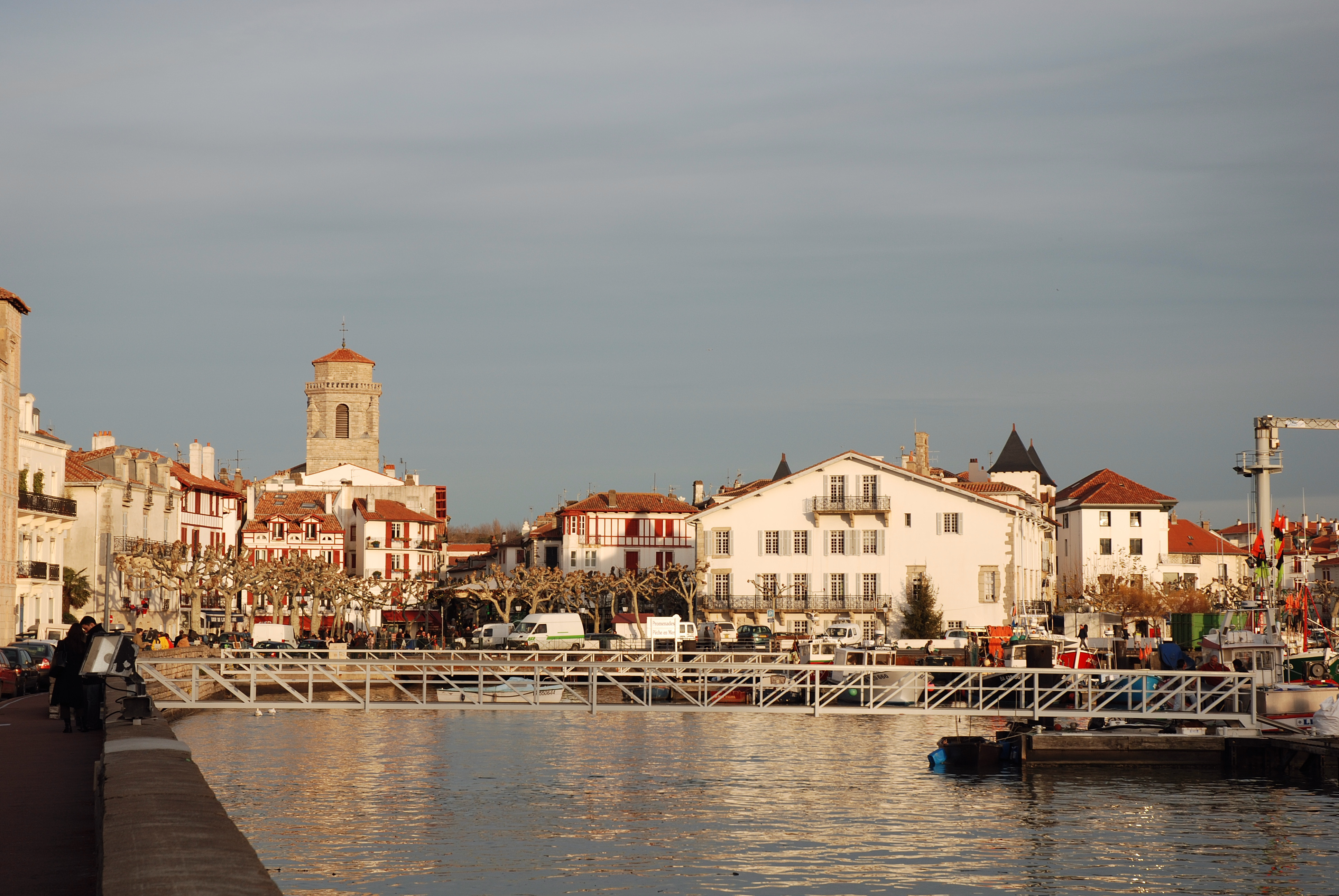 Saint-Jean-de-Luz, l'église Saint-Jean-Baptiste vue du port. Photo prise le 03/01/07 par Harrieta171